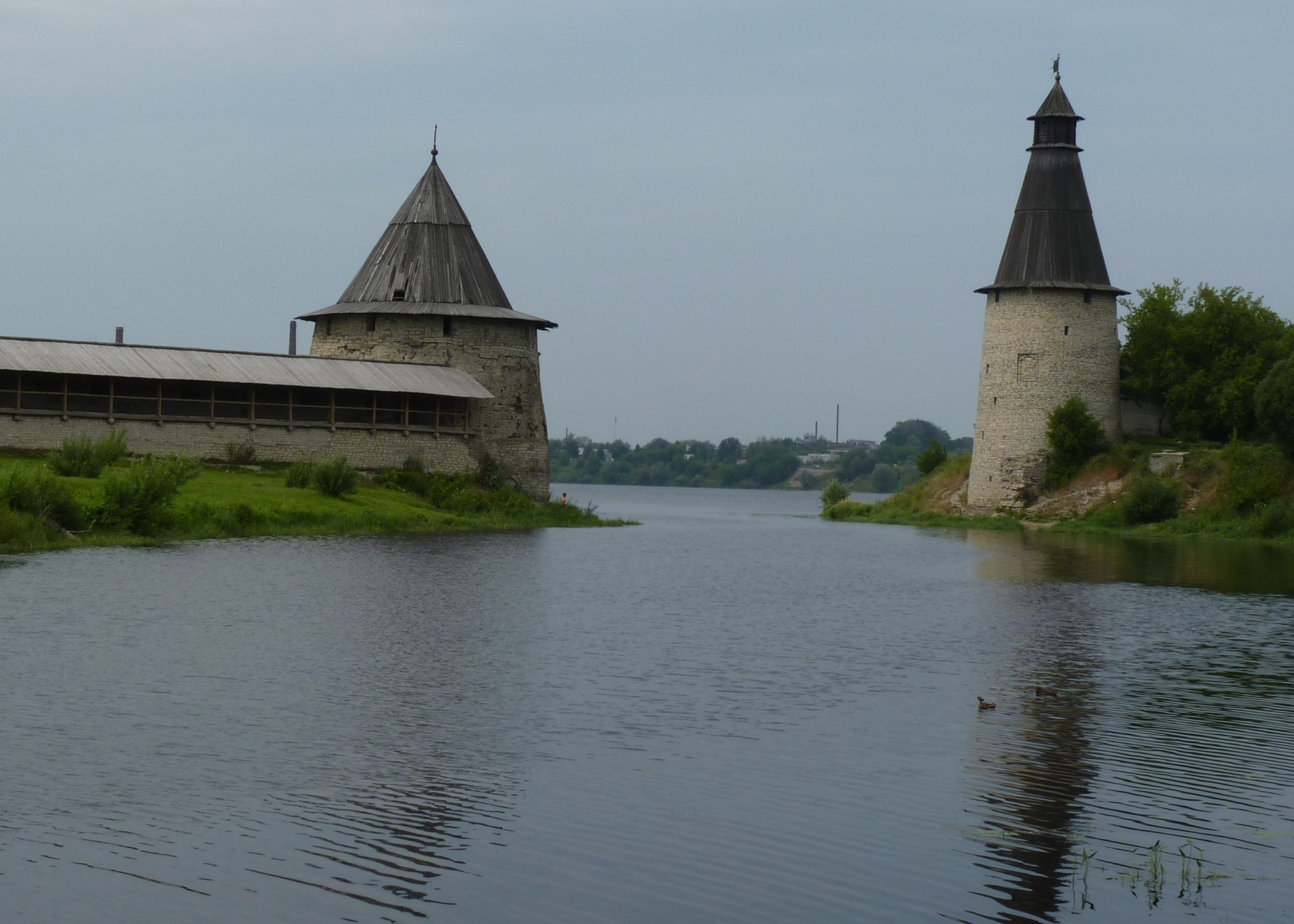 Плоская и Высокая (Воскресенская) башни в устье реки Пскова.